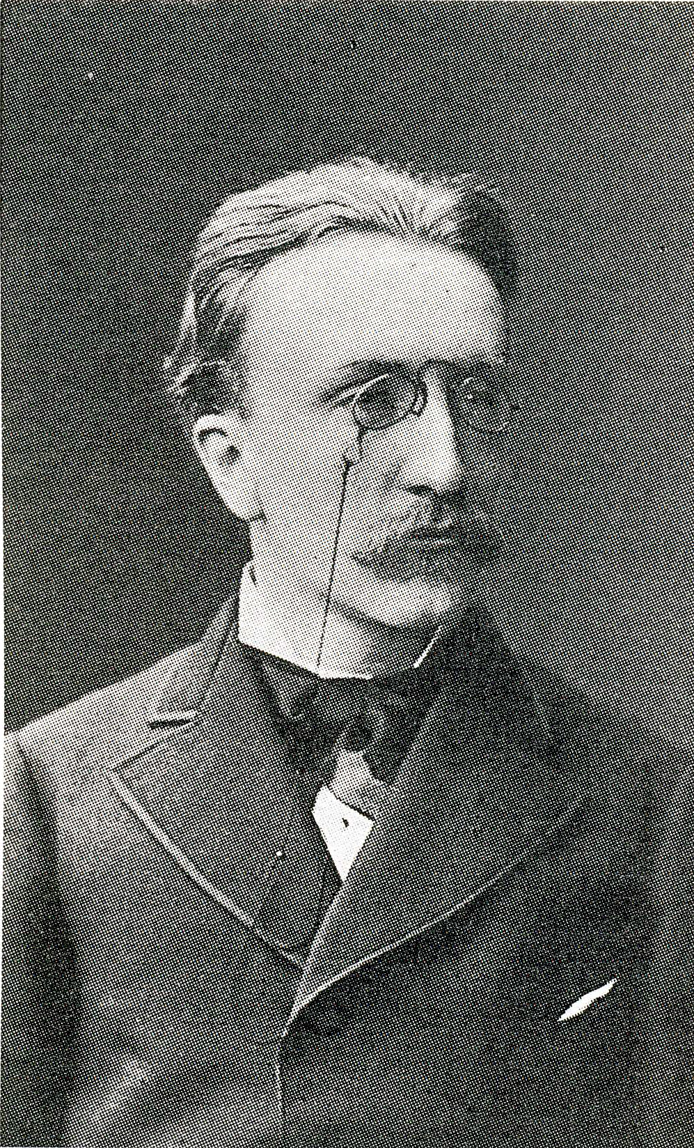 Maatalouskemian professori Arthur Rindell (1852–1936).